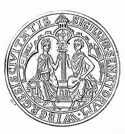 Viborgs segl fra 1421